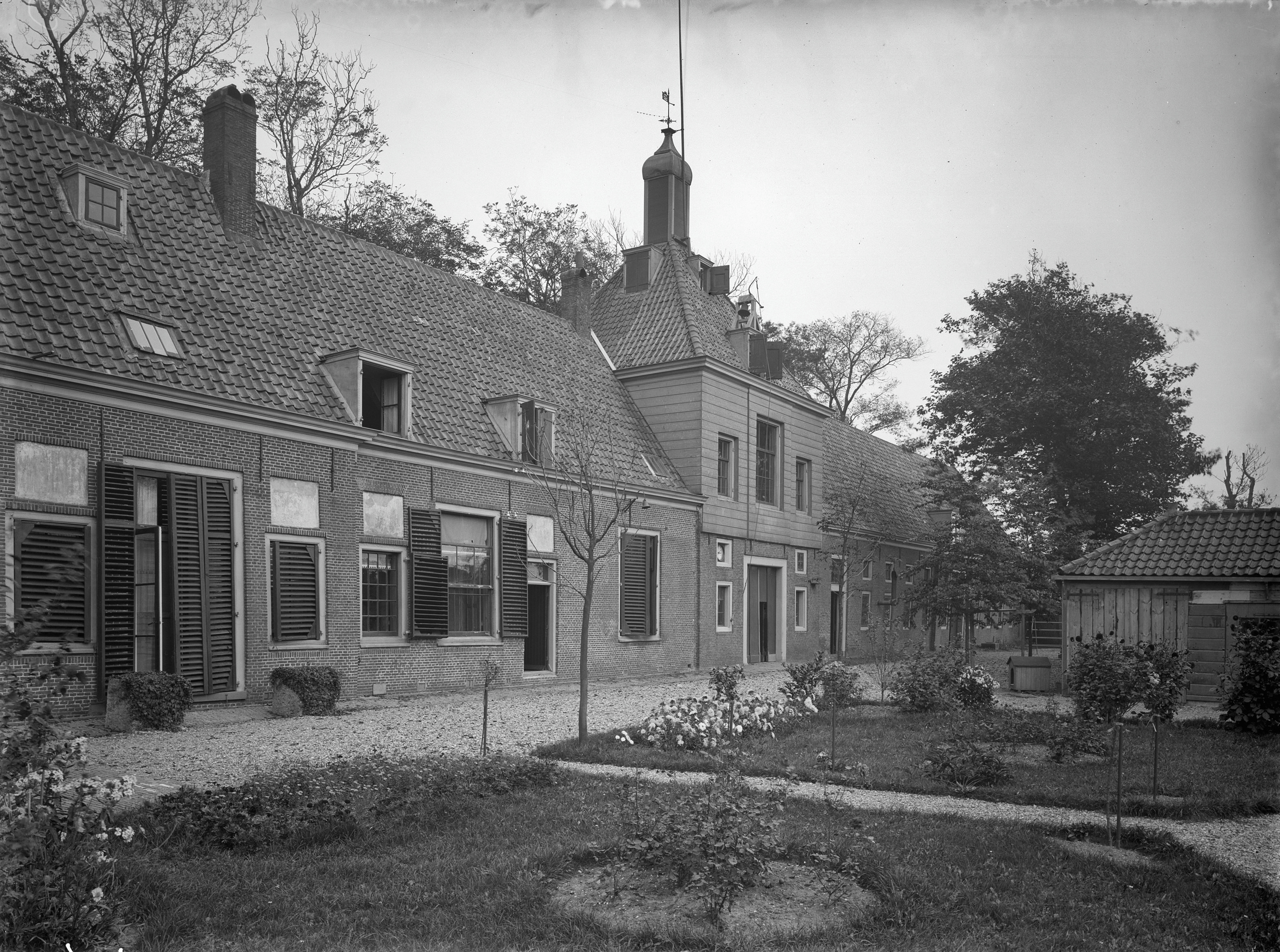 Gemeenlandshuis van Rijnland: exterieur naar het zuid-oosten